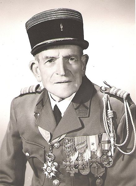 photo du colonel Brébant